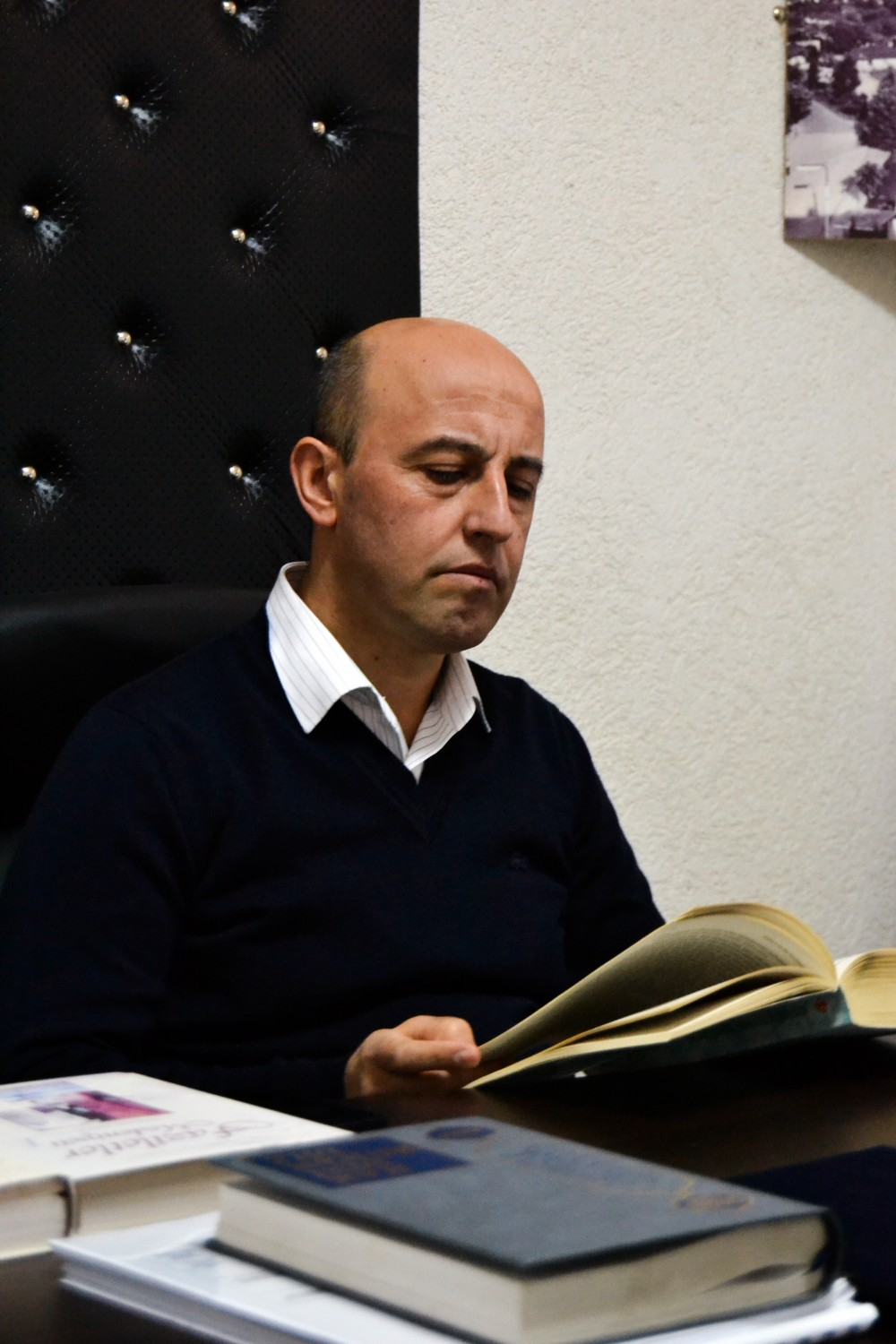 Duke u pregatitur për ligjeratë